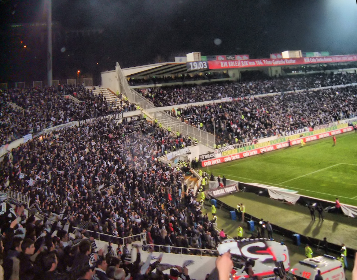 Supporters de Beşiktaş Jimnastik Kulübü lors du matche Gençlerbirliği le 14.3.2009